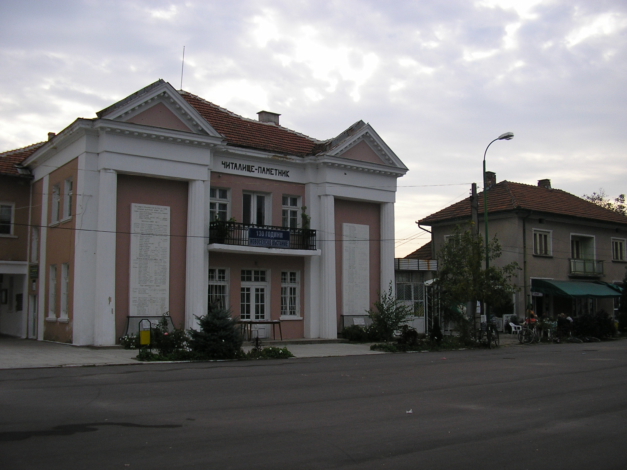 Читалище-паметник в Ново Село - Видинска Област.